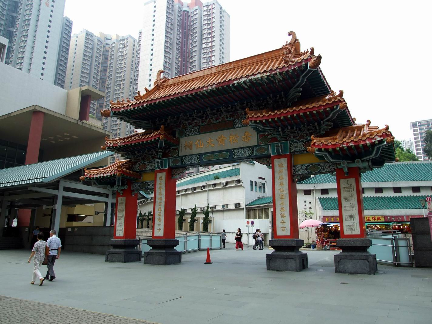 黃大仙祠牌樓 - Wong Tai Sin Temple